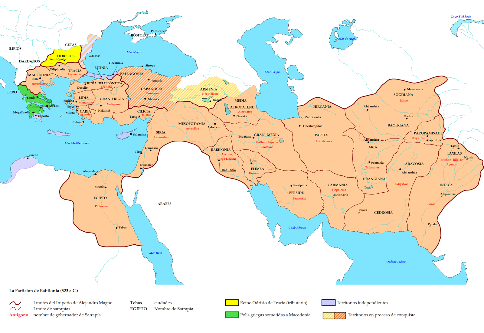 Describe la herencia de alejandro magno un poco mas detalladamente que la imagen anterior.